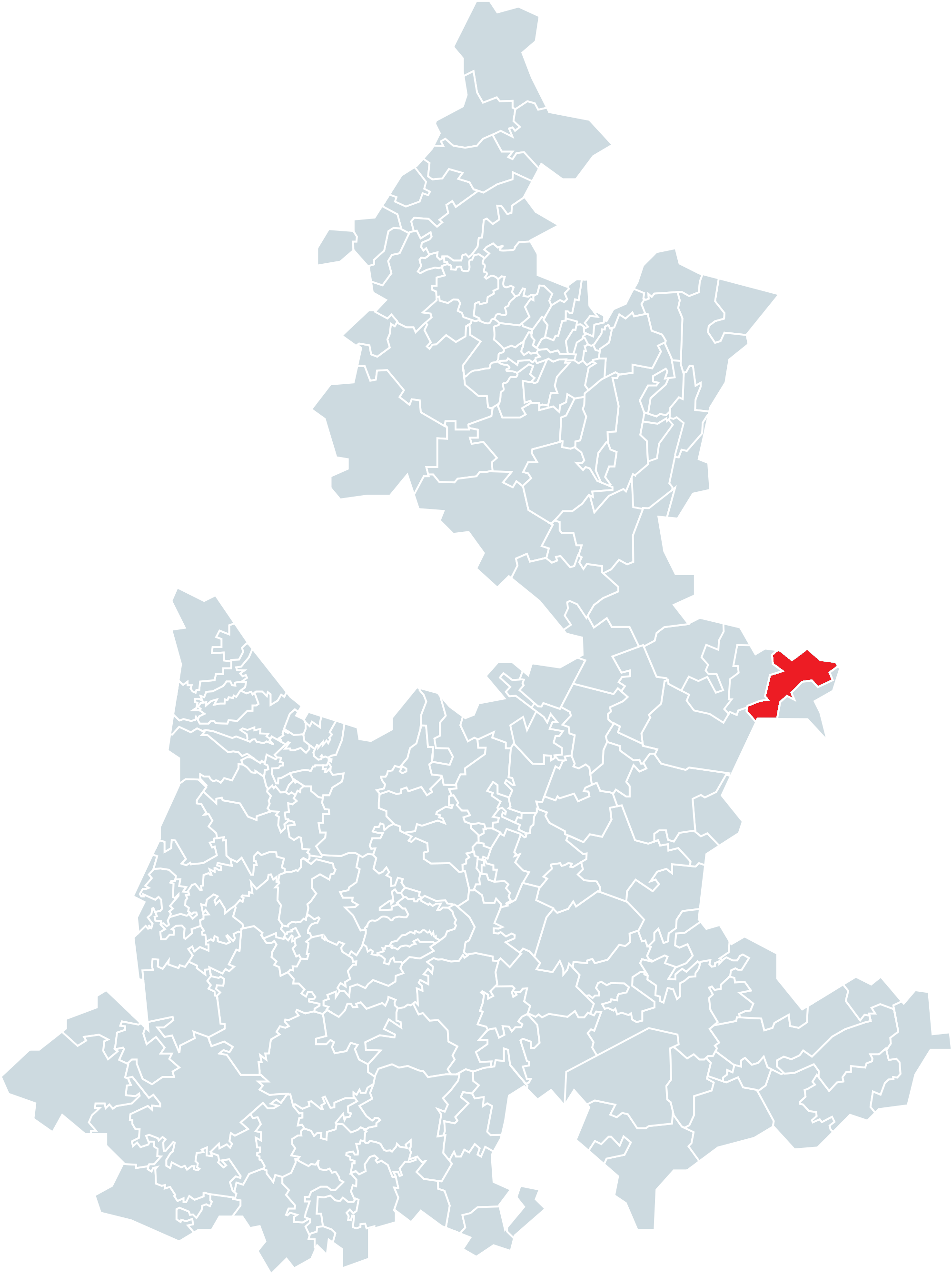 Municipio de Quimixtlán